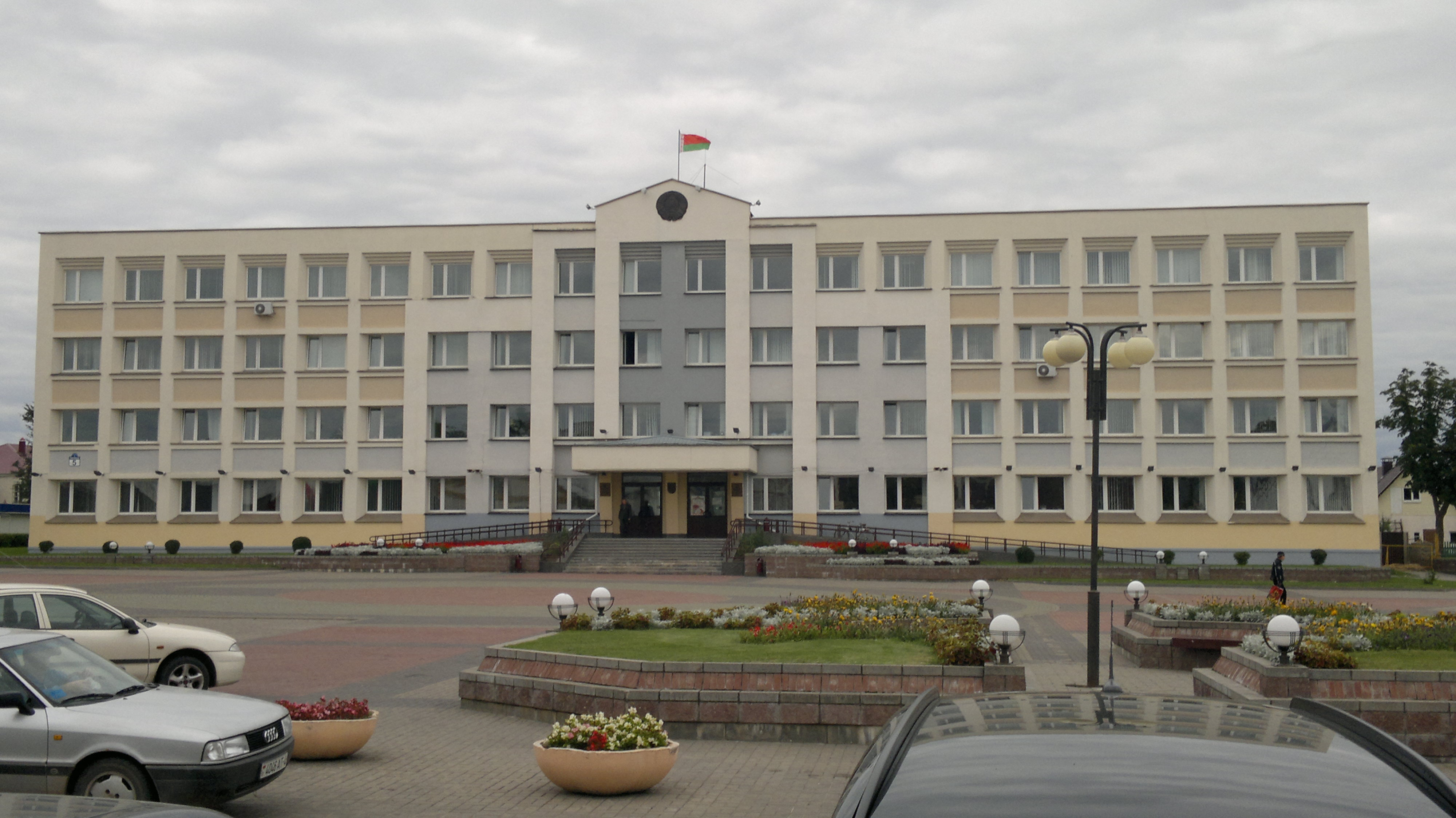 Здание городского и районного исполкомов в Сморгони